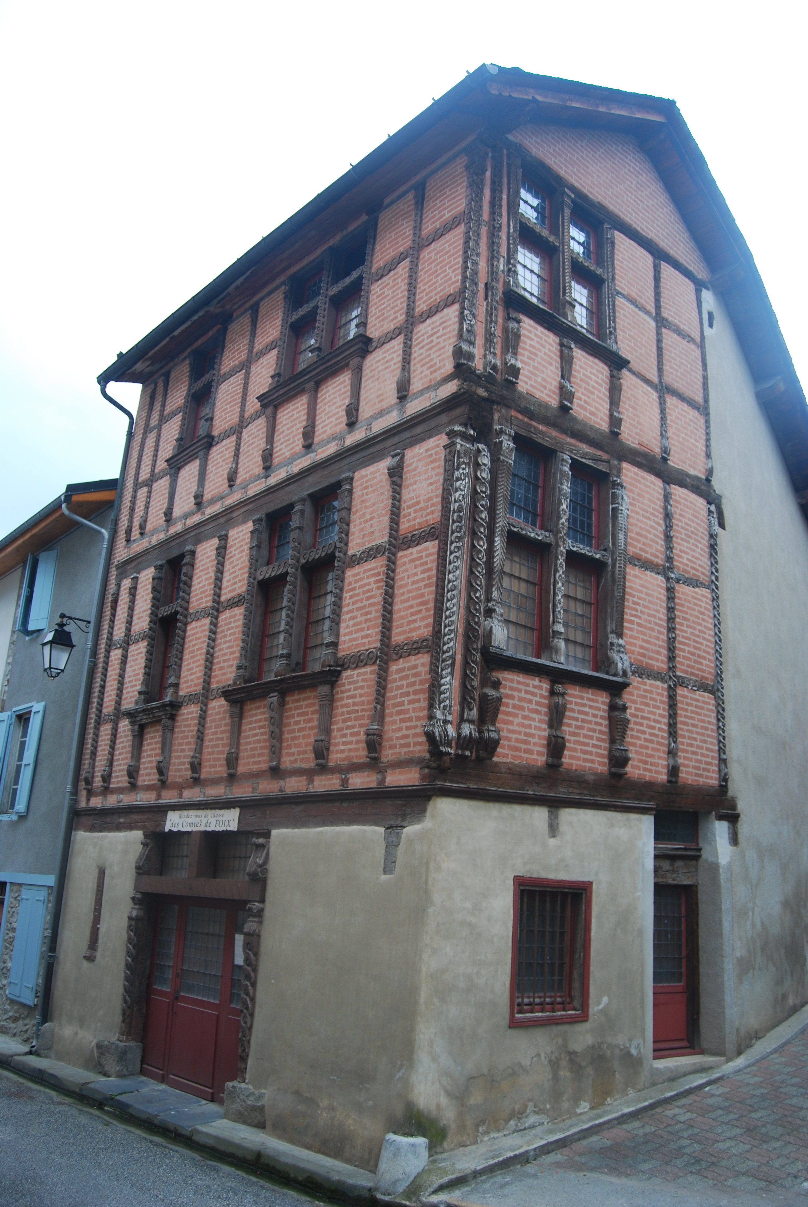 La bâtisse appelée « rendez-vous de chasse des comtes de Foix », Siguer, Ariège. .